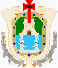 Escudo de la ciudad de Veracruz, México, otorgado por el Emperador Carlos V. Coat of mexican Veracruz City, given by Charles V, Holy Roman Emperor.